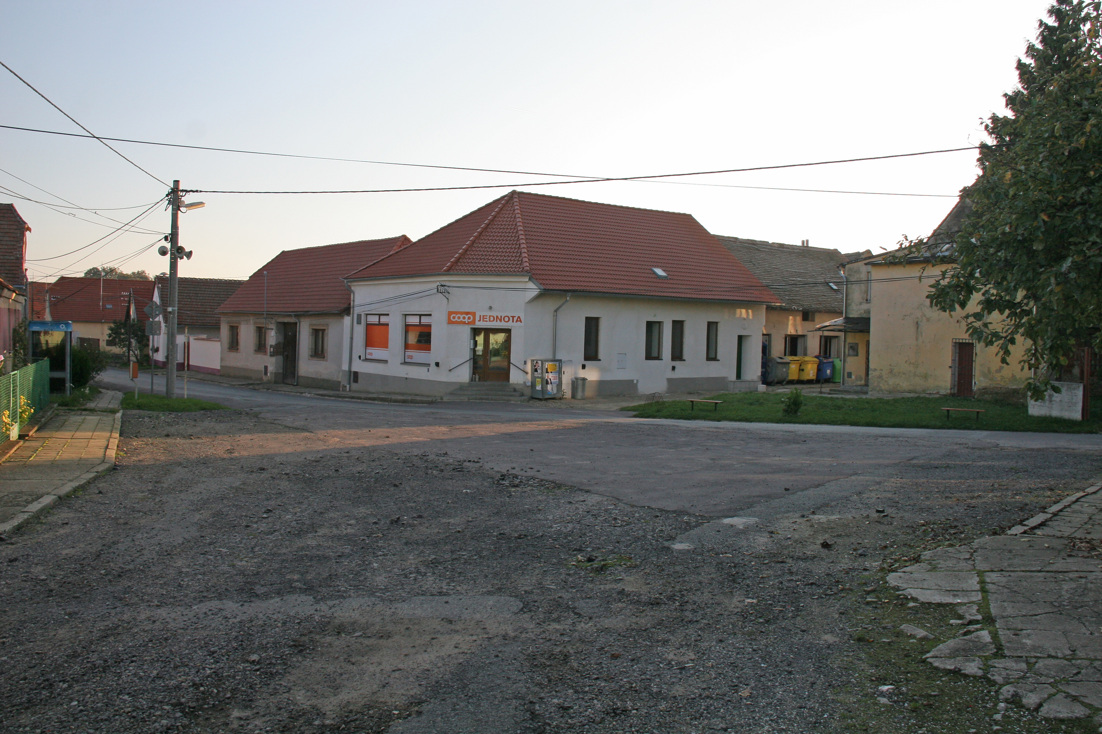 Vracovice prodejna